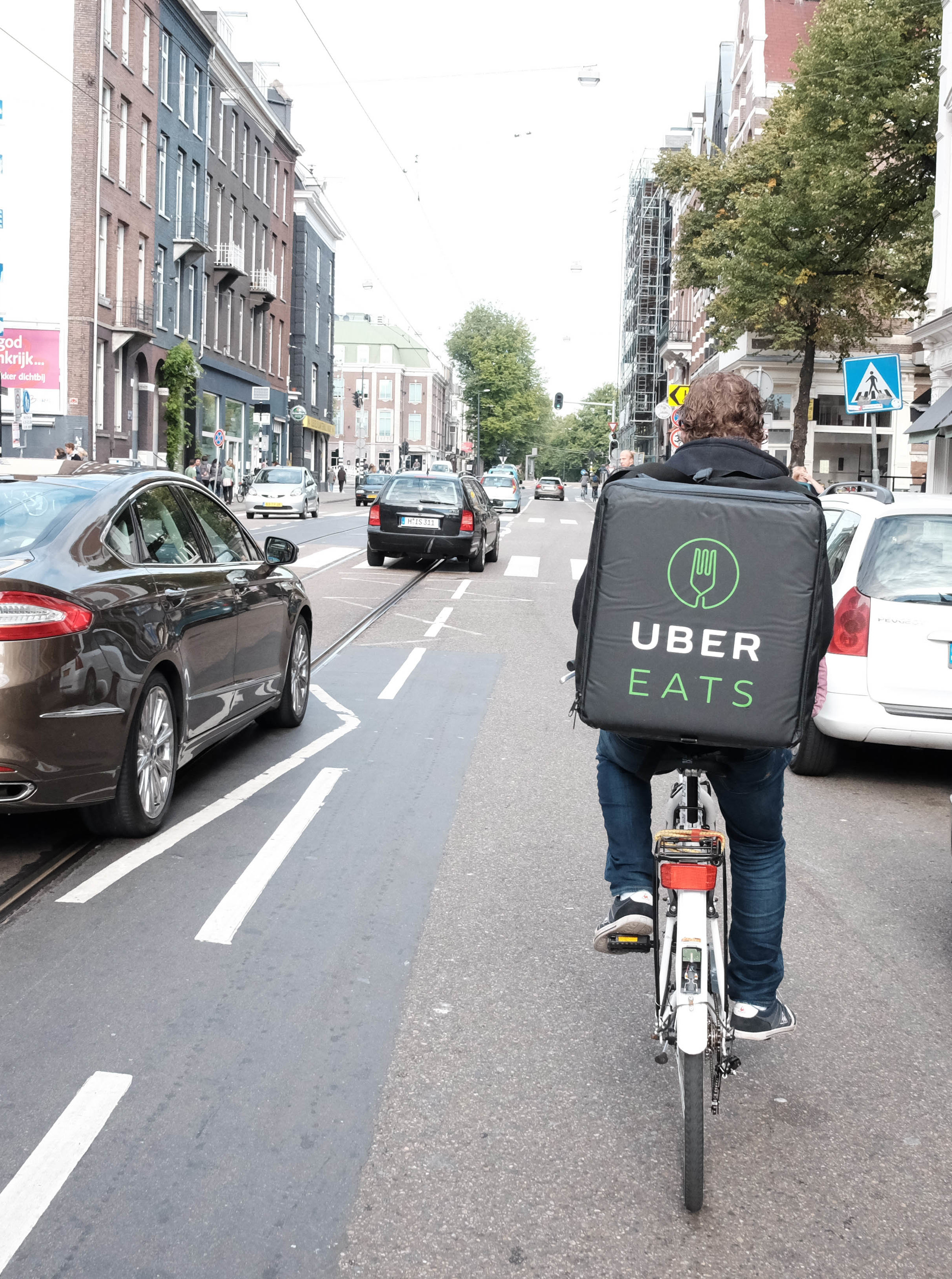 UberEats delivery by bike in Amsterdam